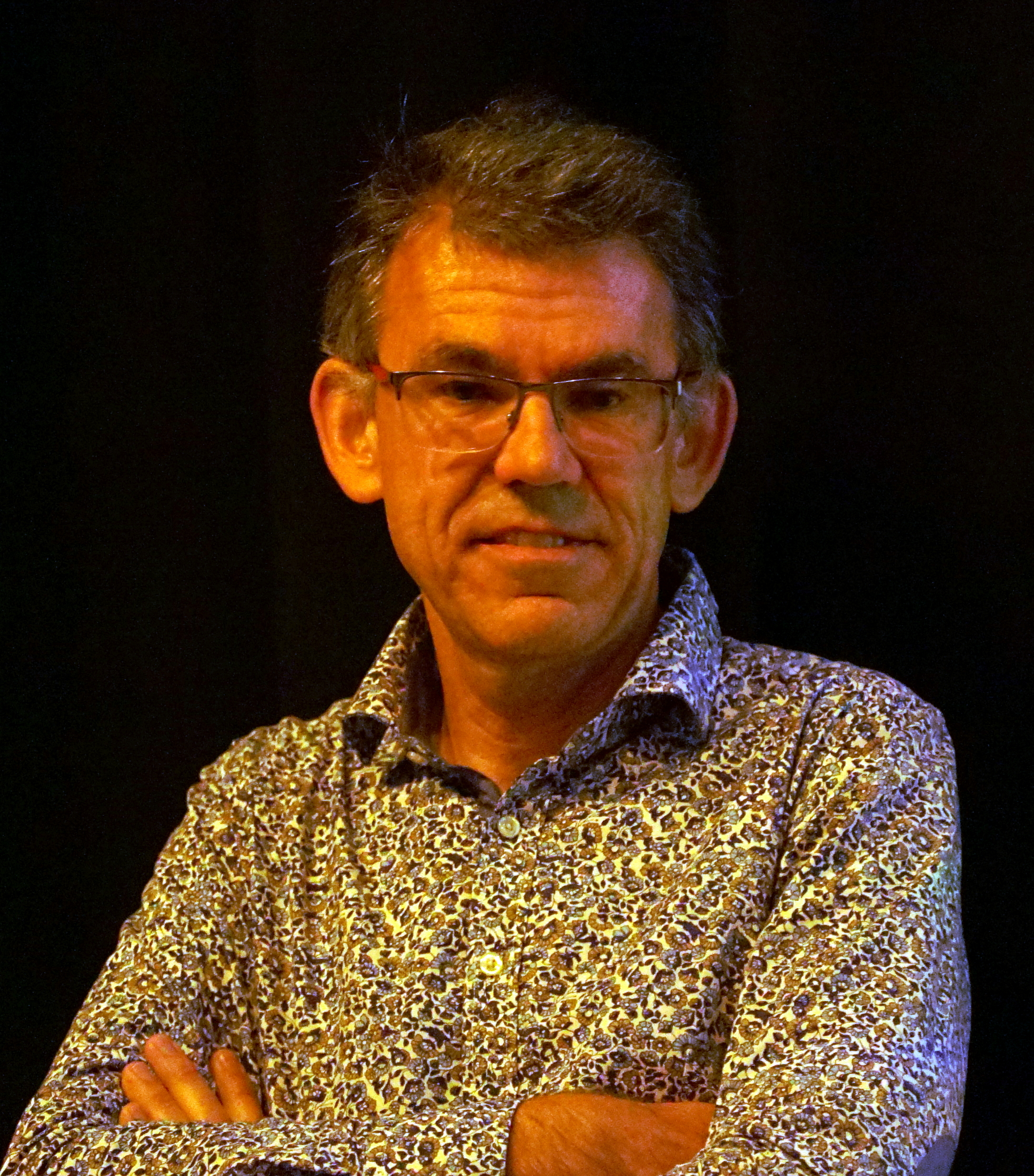 à la recherche de la IXe planète.